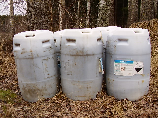 AIV-rehun valmistuksessa käytettävää muurahaishappoa varastoituna tynnyreissä pellonreunalla.